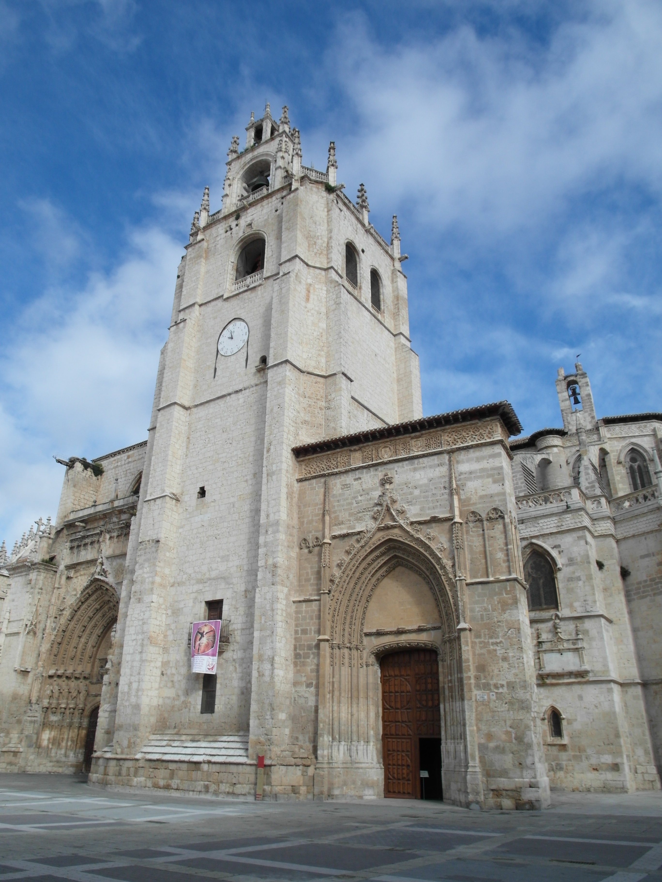 Catedral de Palencia, Palencia.